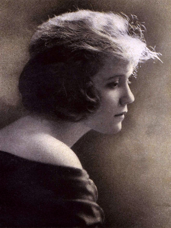 Virginia Kirtley, actrice américaine du cinéma muet